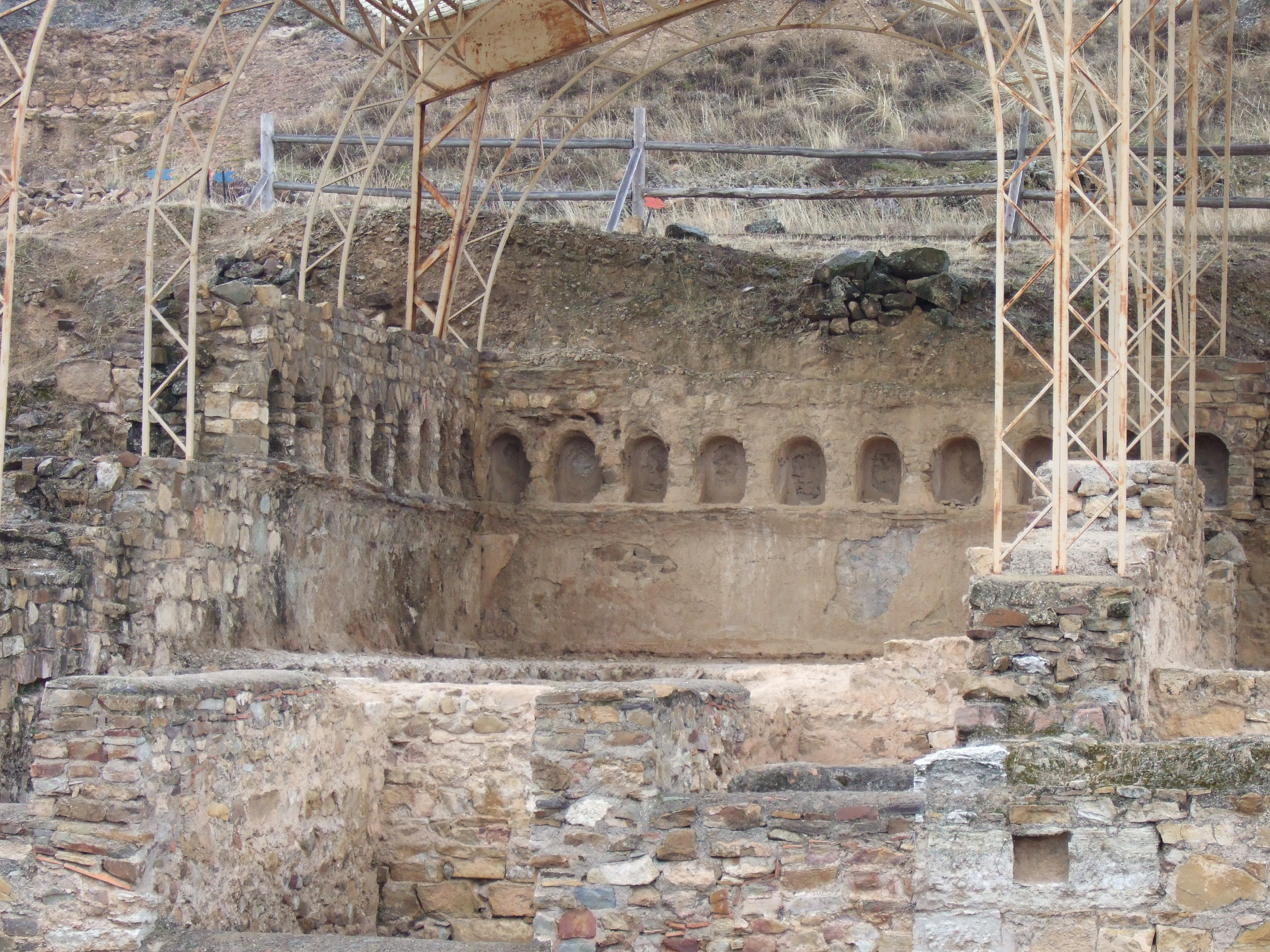 Termas de Bílbilis, abandonadas a finales del siglo II D.C.